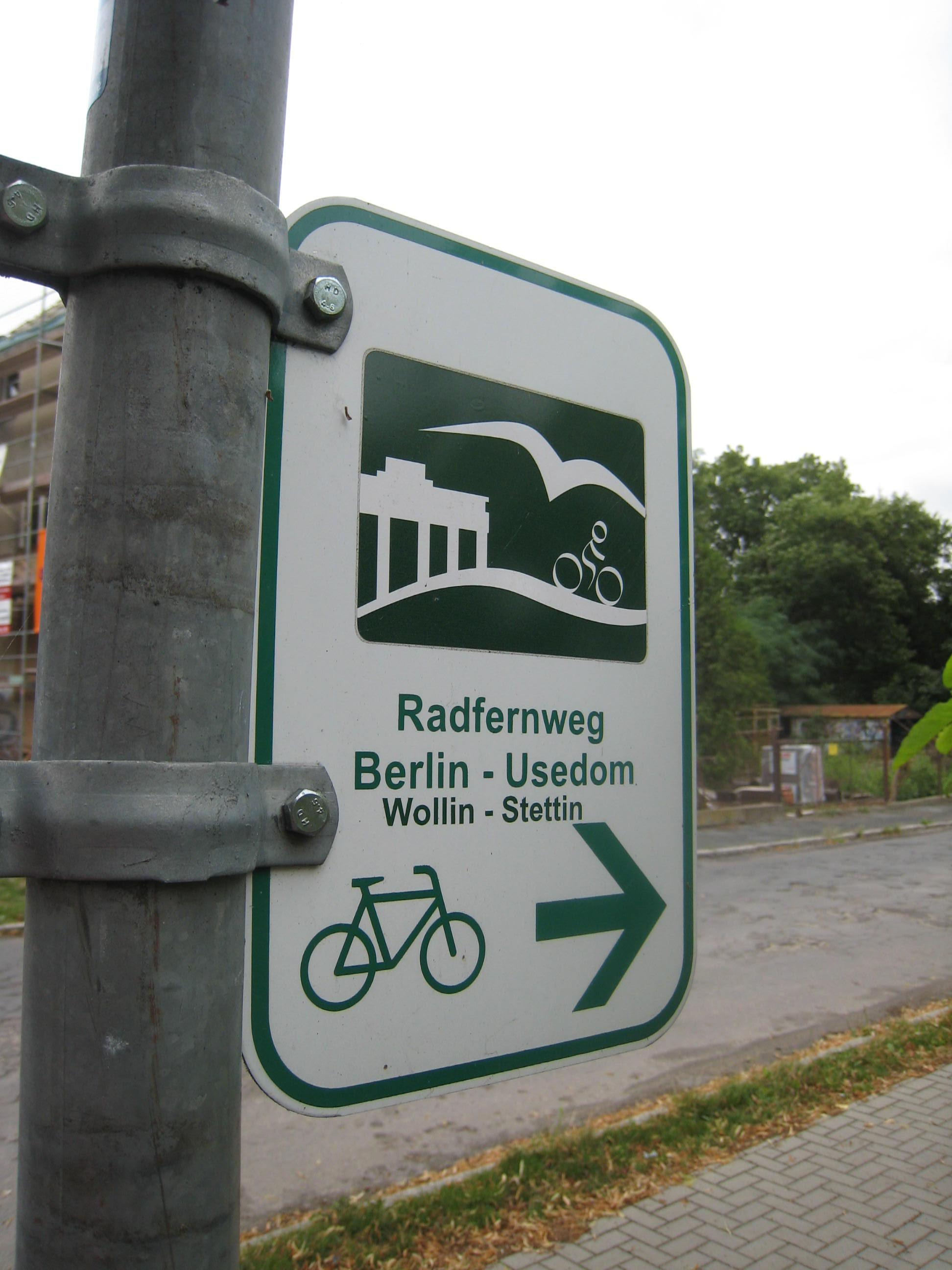 Radfernweg Berlin - Usedom - Wollin - Stettin